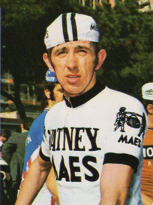 FIGURINA PANINI CAMPIONI DELLO SPORT ANNO 1973/74 N. 149 CICLISMO VERBEECK